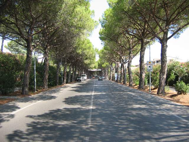 Allee zwischen Cecina und Cecina Mare